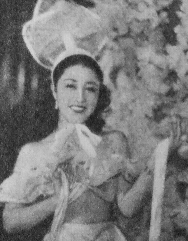 草笛光子（SKD時代）